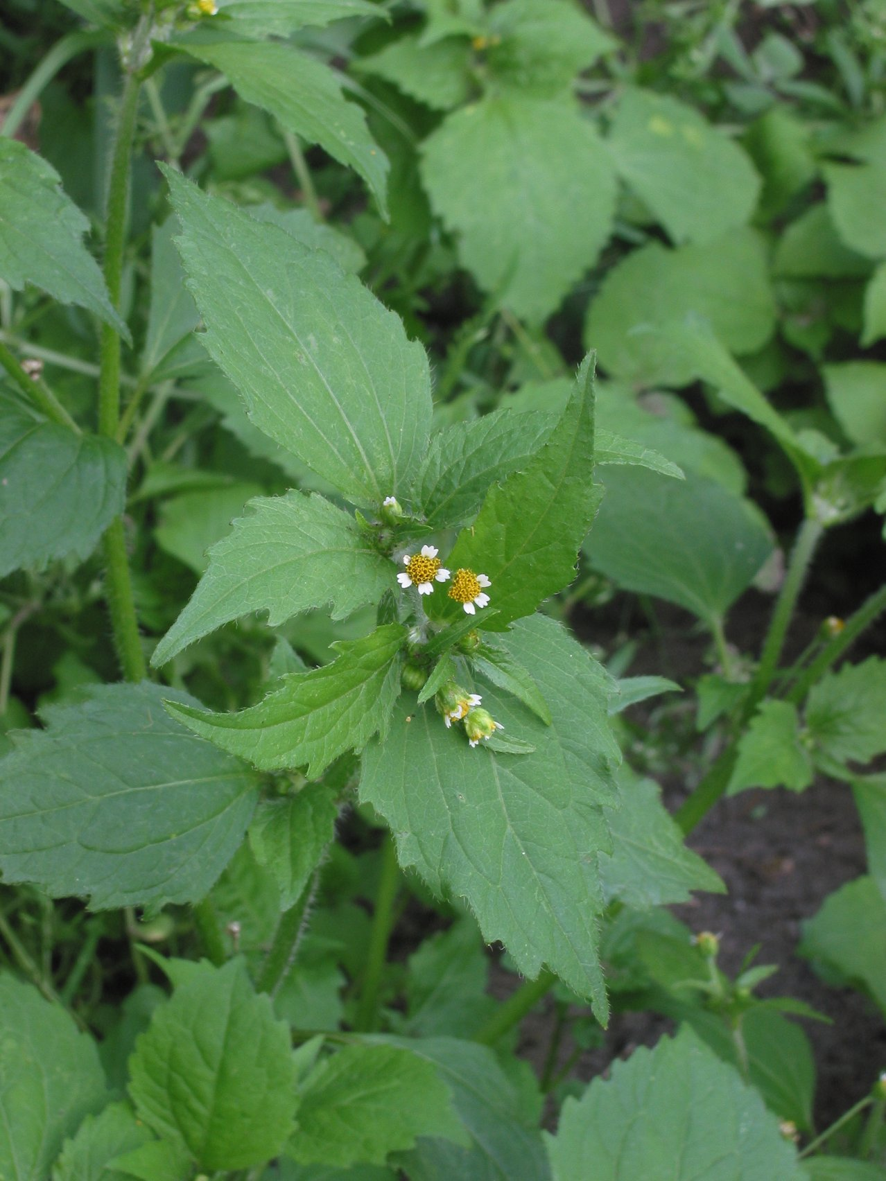 (nl: Harig knopkruid bloemen) Galinsoga quadiradiata